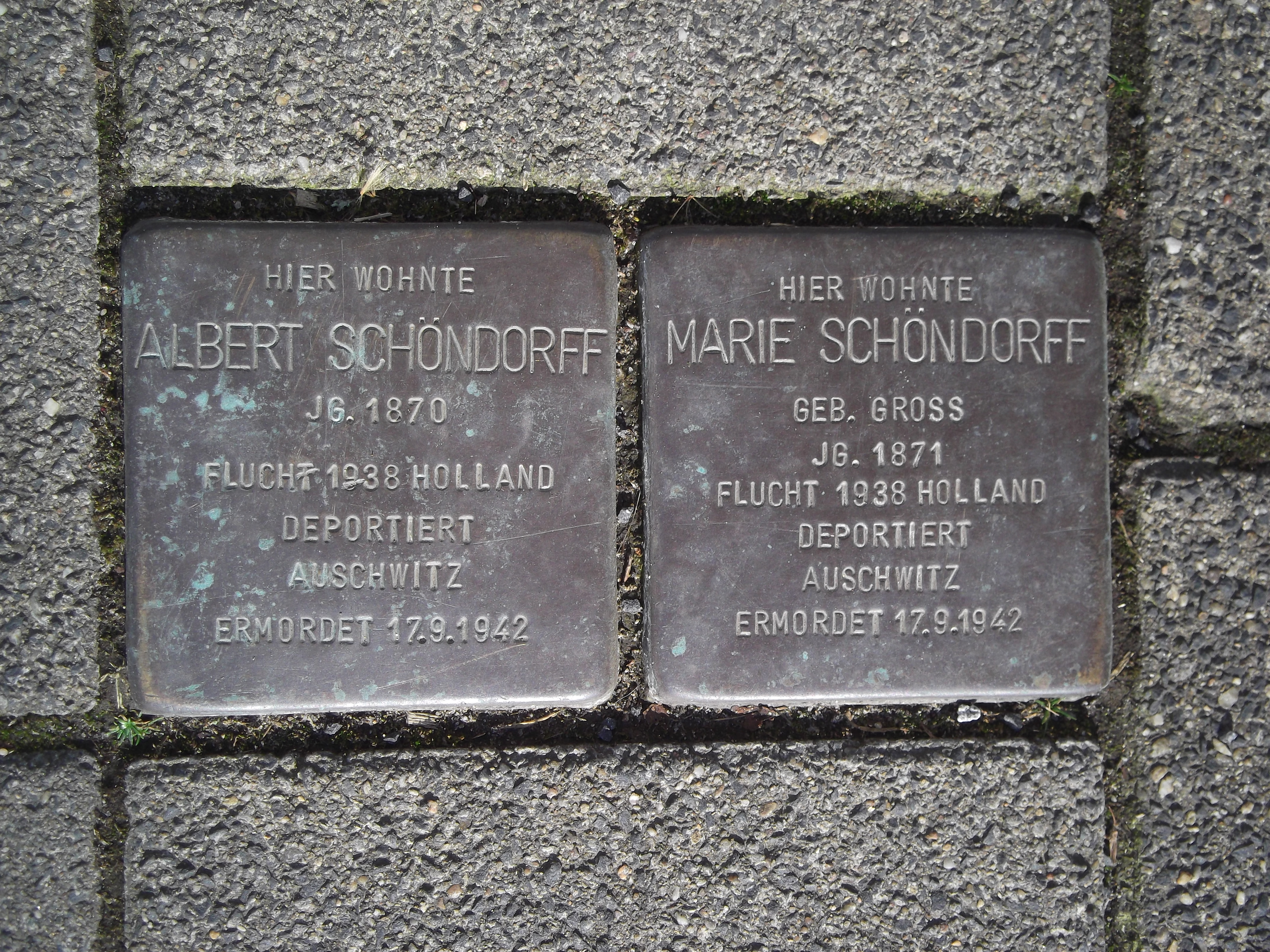 Stolperstein, Düsseldorf, 1, Golzheim, Cecilienallee 19, 2 Stolpersteine